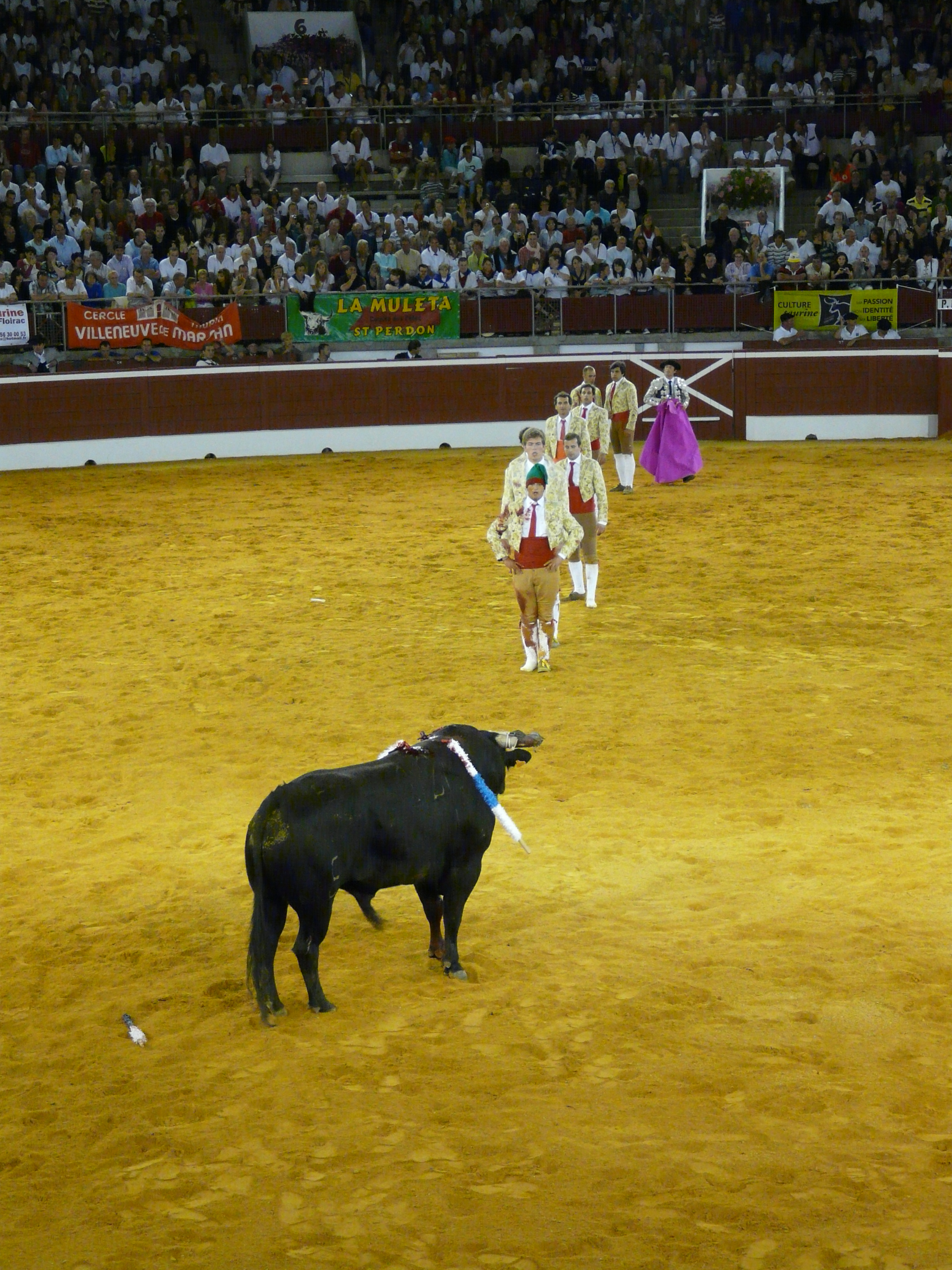 Corrida portugaise de Mont-de-Marsan.